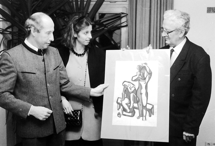 Josef Dering (rechts) übergibt einen Druck an die Artothek in Eichenau, links Bürgermeister Sebastian Niedermeier mit Kulturamtsleiterin Schmöller (1987)